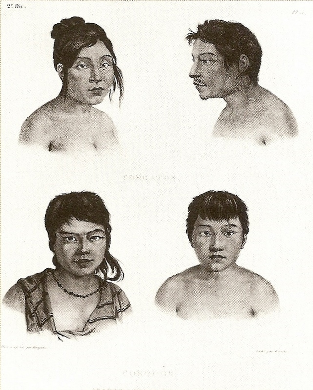 Coroatos e Coropos (litogravura, 22,3 x 19,5 cm)